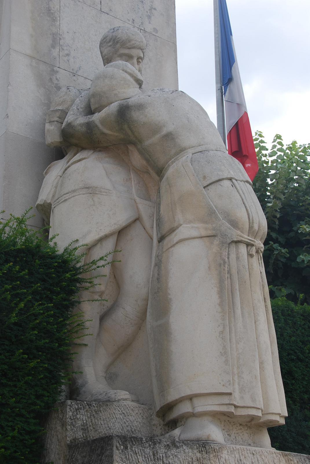 Chateauroux-Ernest-Nivet Monument aux morts